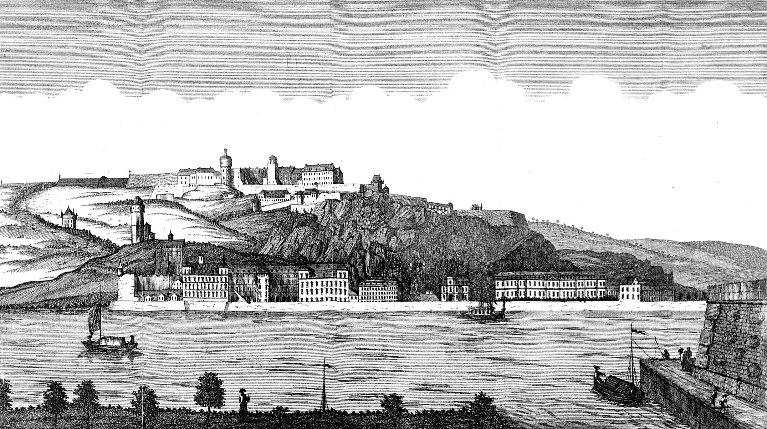 Ehrenbreitstein mit Philippsburg, oberhalb auf dem Plateau die kurtrierische Festung Ehrenbreitstein, unten auf der linken Seite das Schloss Philippsburg, unten auf der rechten Seite der Dikasterialbau mit dem Marstall rechts daneben; vorn rechts das Deutsche Eck.